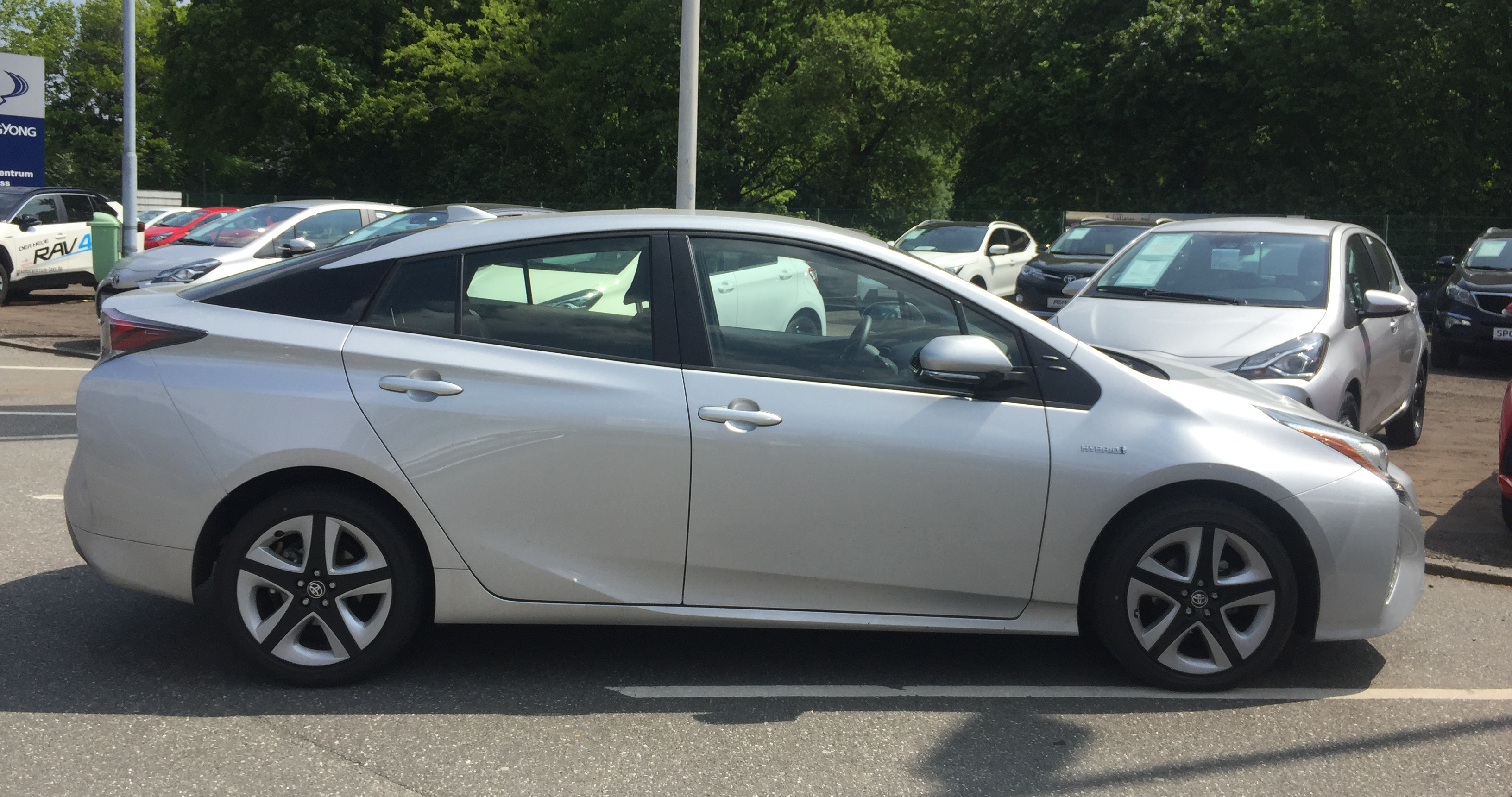 Toyota Prius Hybrid Seitenansicht